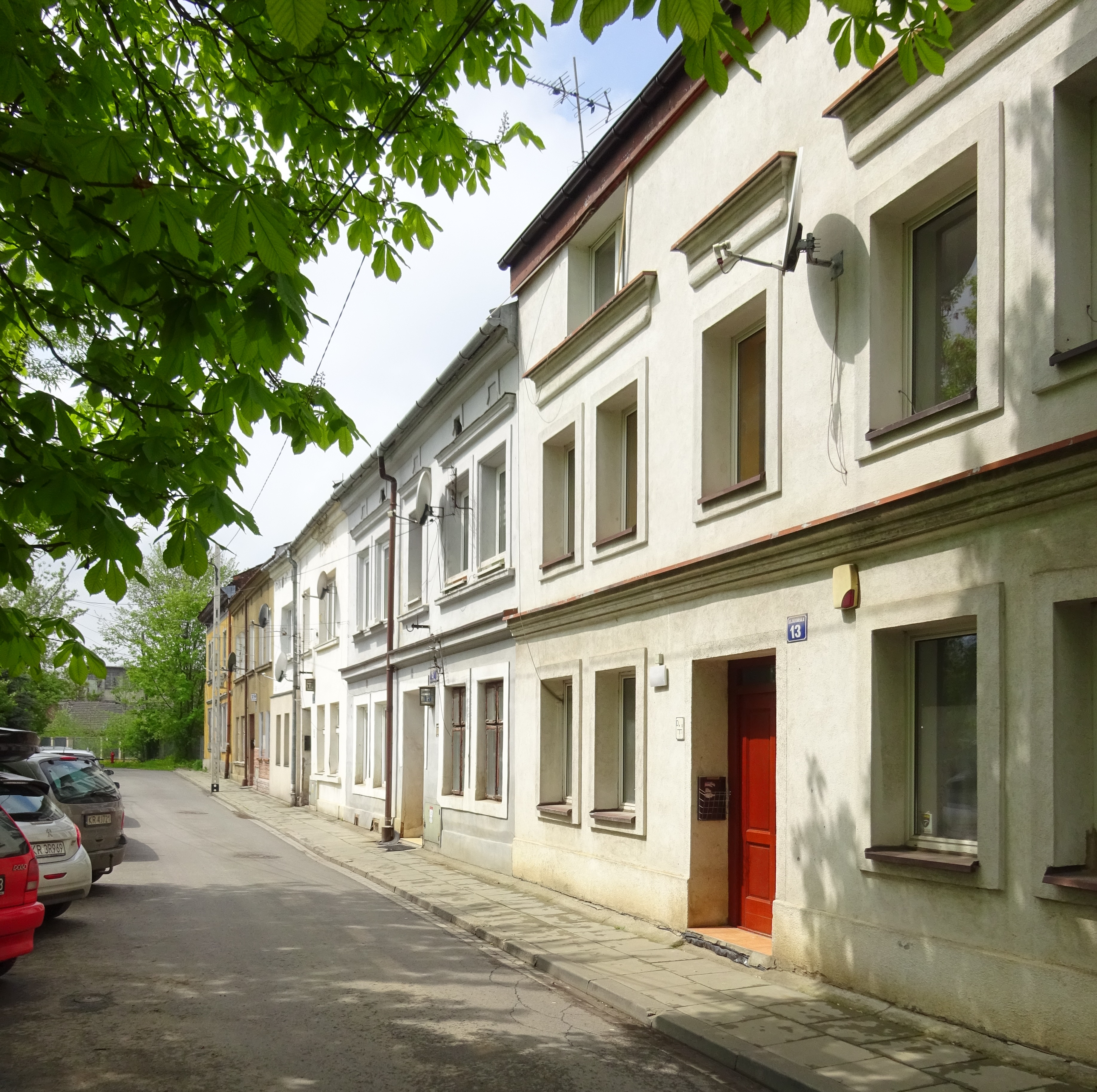 Pozostałości historycznej zabudowy dzielnicy Ludwinów, przy ul. Zatorskiej w Krakowie. 2017